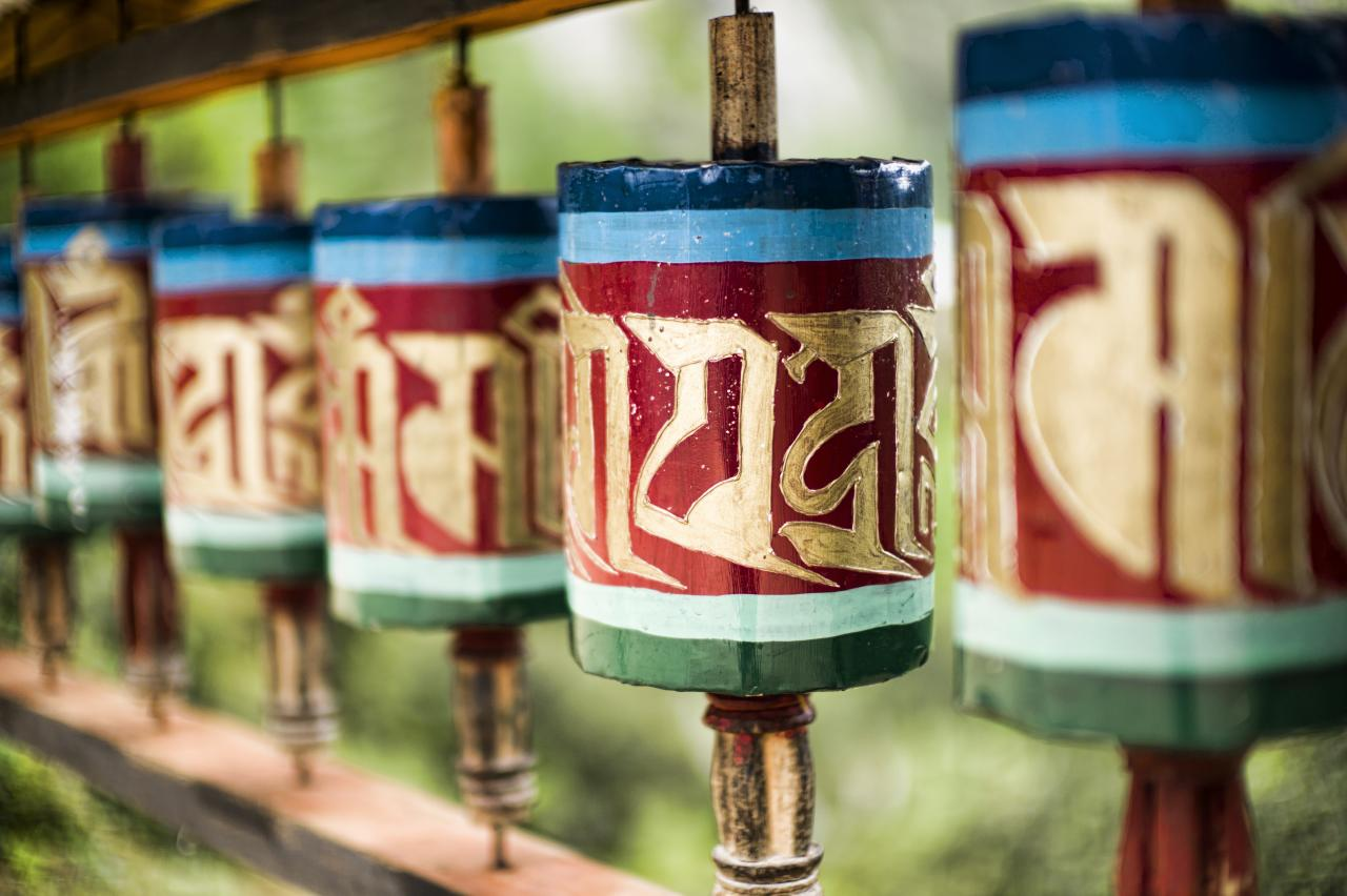 Bhutan